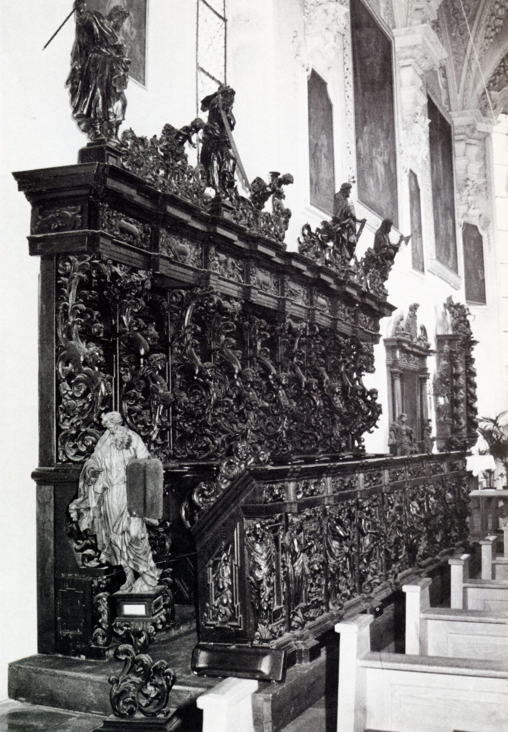 Buxheimer Chorgestühl um 1980